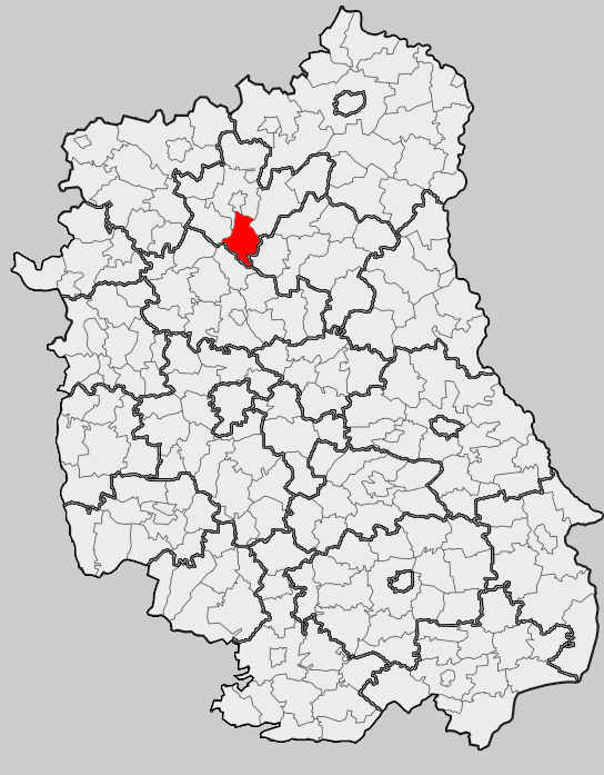 Map of gmina Czemierniki, Radzyń Podlaski county, Lublin voivodship Mapa gminy Czemierniki, powiat radzyński, województwo lubelskie